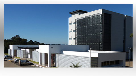 Escritório P&D no parque tecnologico Univates